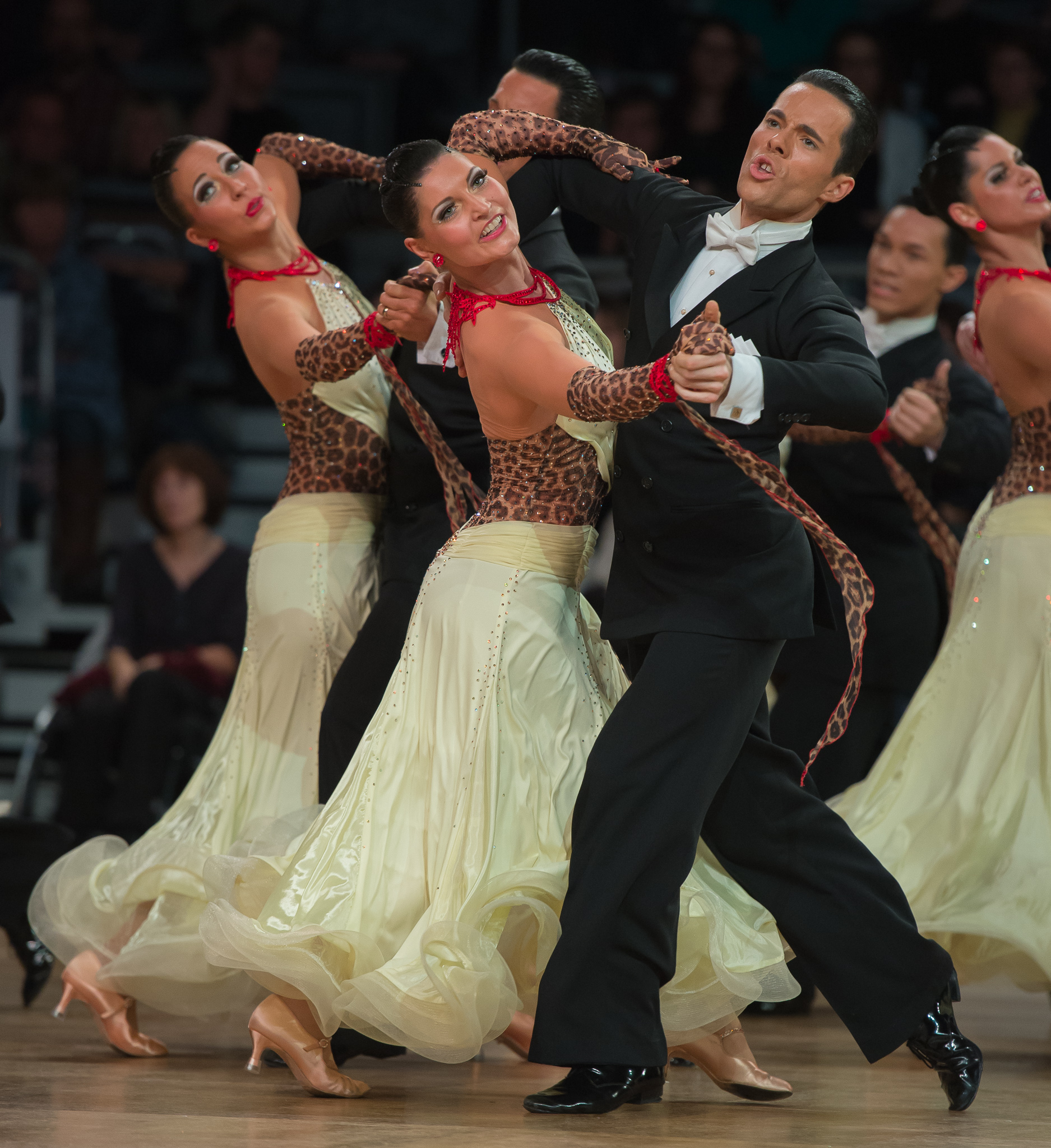 Braunschweiger TSC,Brose Arena Bamberg,Deutsche Meisterschaften der Formationen Standard & Latein 2016,In constant touch,Standard,Tanzsport